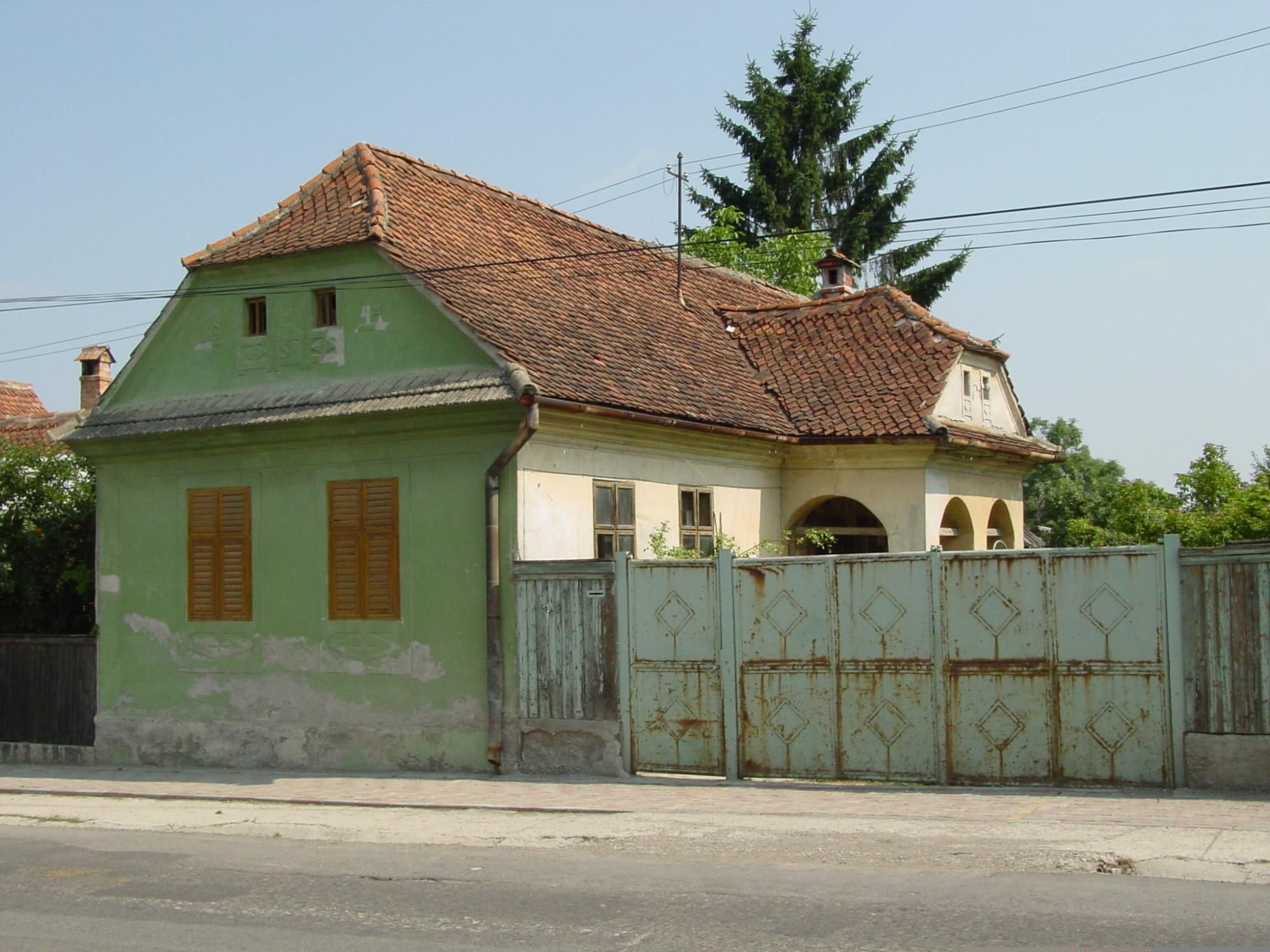 Casă de la 1844 -fatada la strada